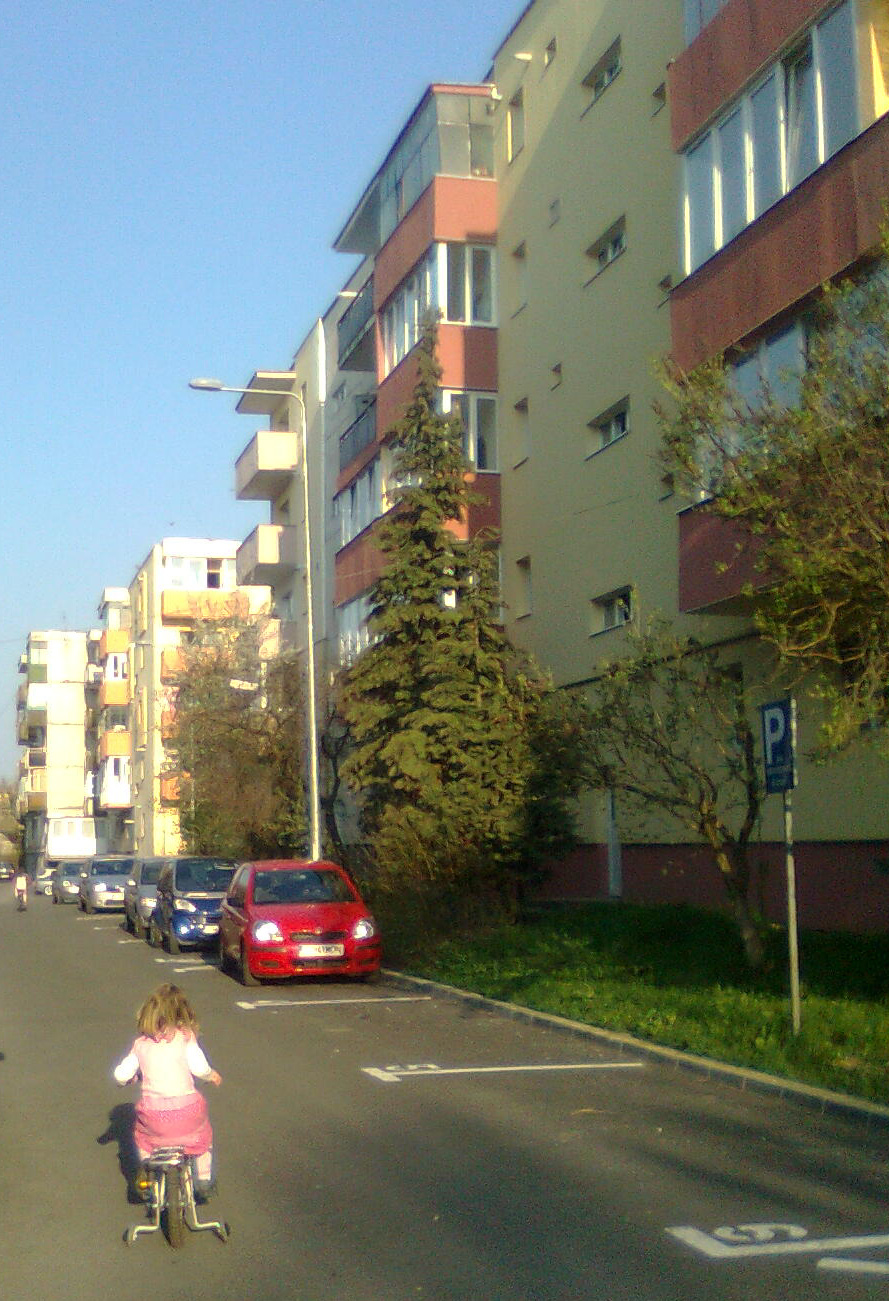 Kolozsvári Hajnal negyed tavasszal